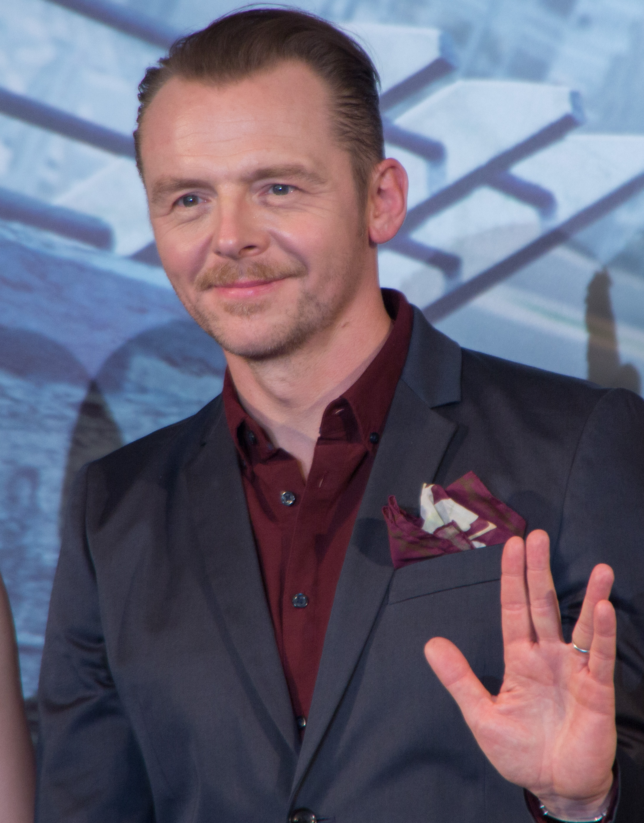 スター・トレック BEYOND ジャパン・プレミア レッドカーペット サイモン・ペッグ 前田敦子